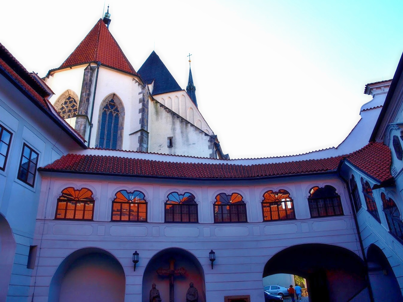 Někdejší jezuitská kolej, dnes Hotel Růže v Horní ulici 154, Český Krumlov